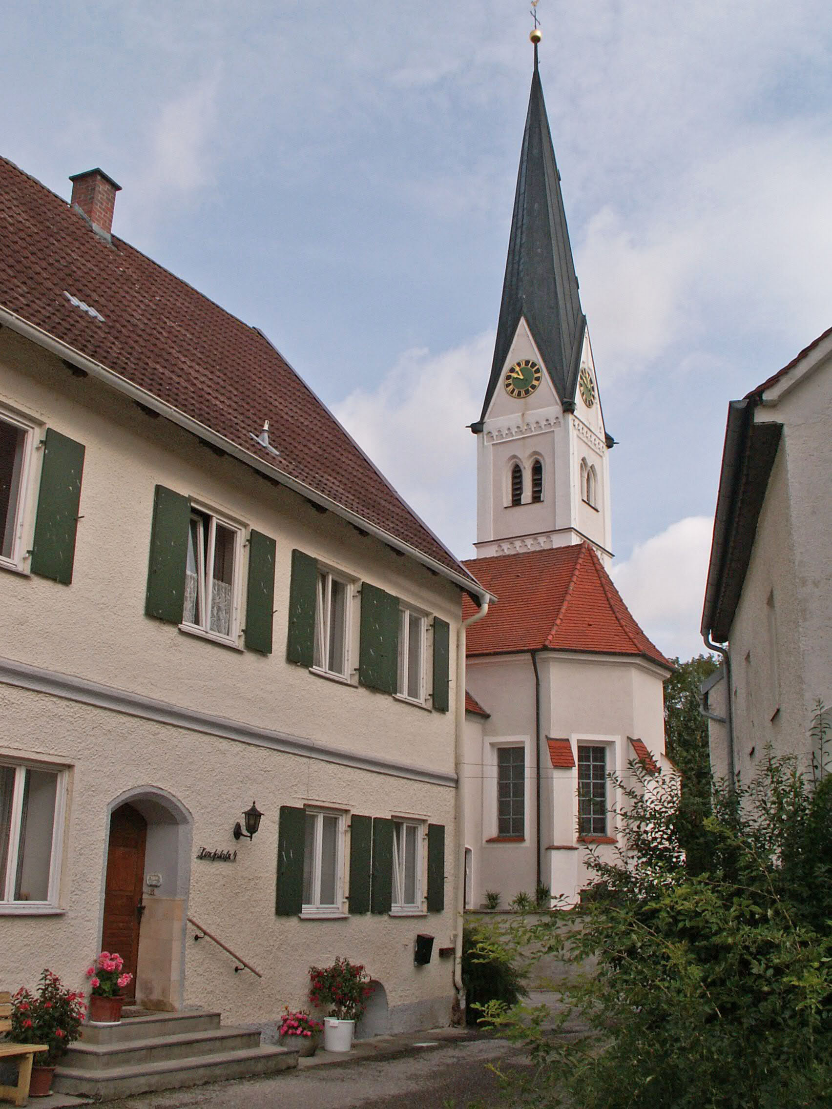 Kirchplatz in Schmiechen